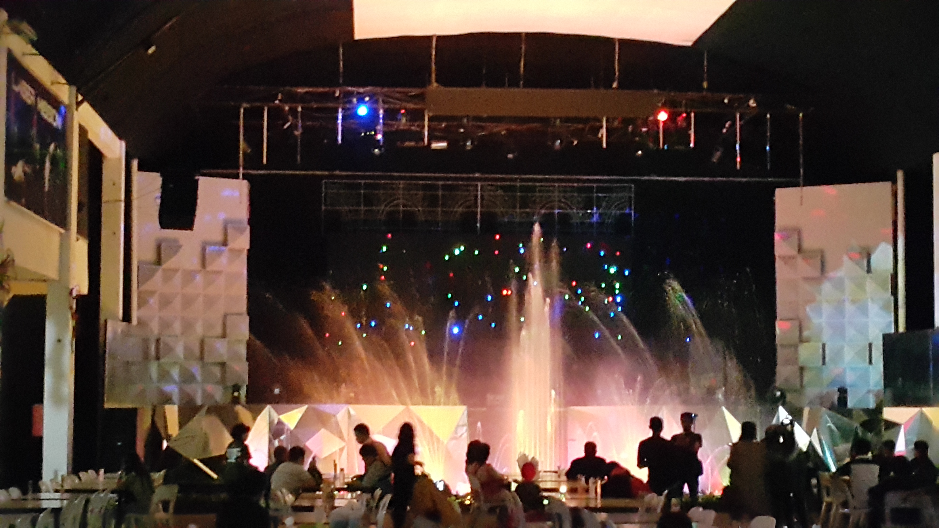 Singing Fountain di BNS